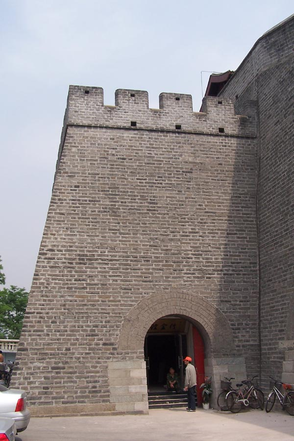 Beijing Ancient Observatory